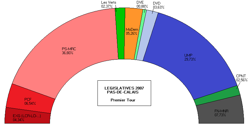 Législatives 2007, Résultats du Premier Tour dans le Pas-de-Calais.